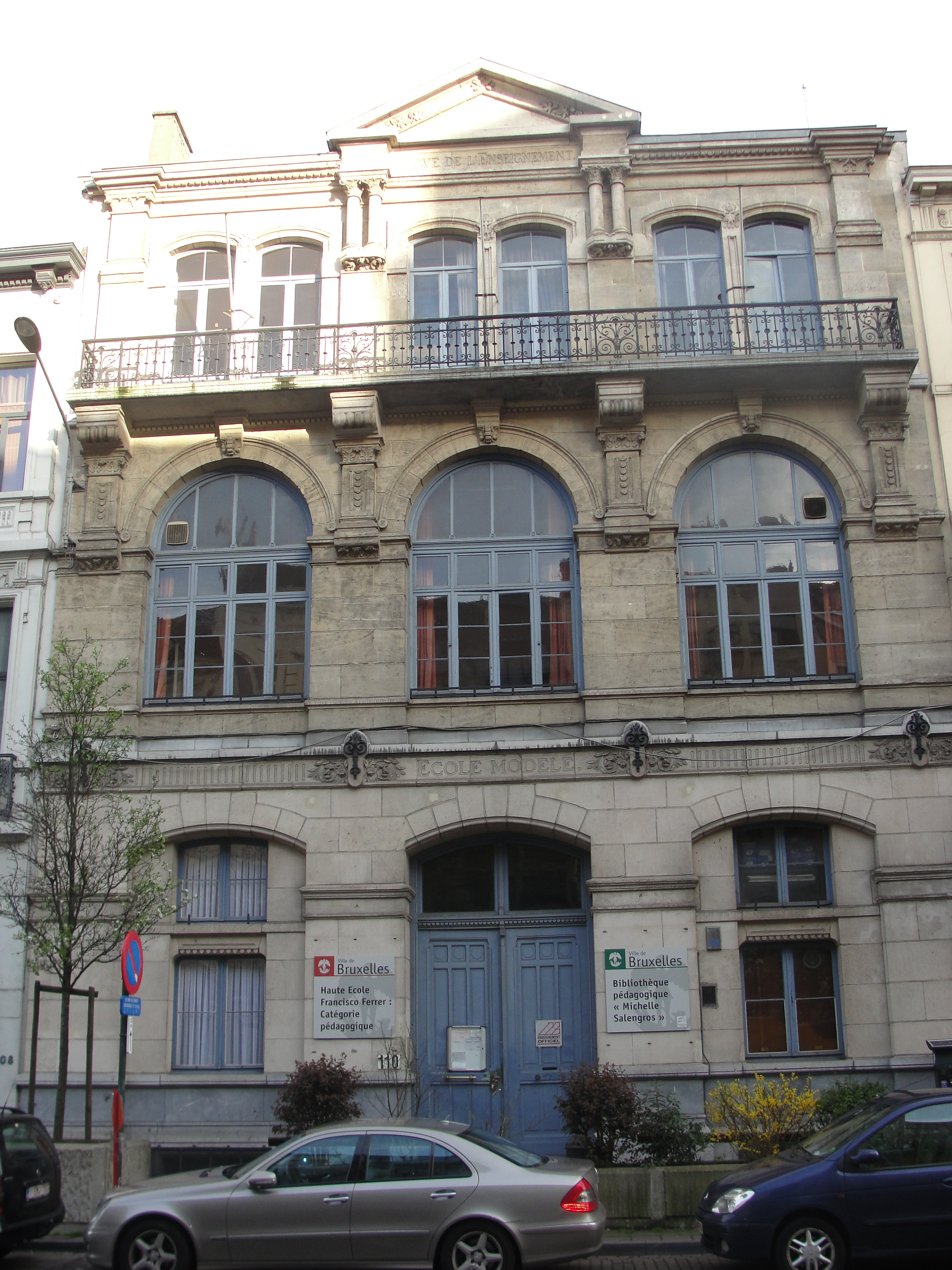 Brussel, Maurice Lemonnierlaan 110. Modelschool ingericht door de "Ligue de l'Enseignement", naar ontwerp van Ernest Hendrickx (1873), ingehuldigd 1875. Negentiende prijs in gevelwedstrijd van 1876. Later normaalschool Charles Buls, thans onderdeel van hogeschool Francisco Ferrer.